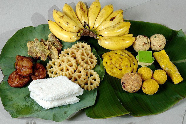 Sinhala, Tamil New Year Sri Lanka